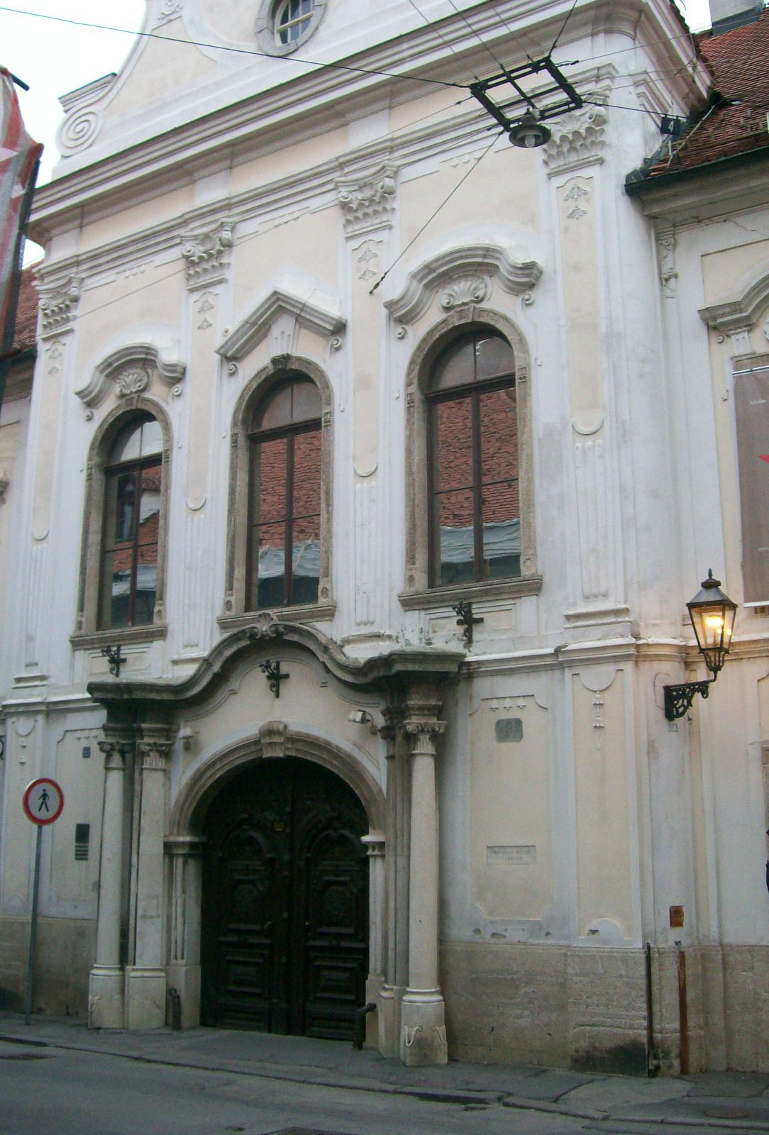 Hrvatski povijesni muzej Zagreb